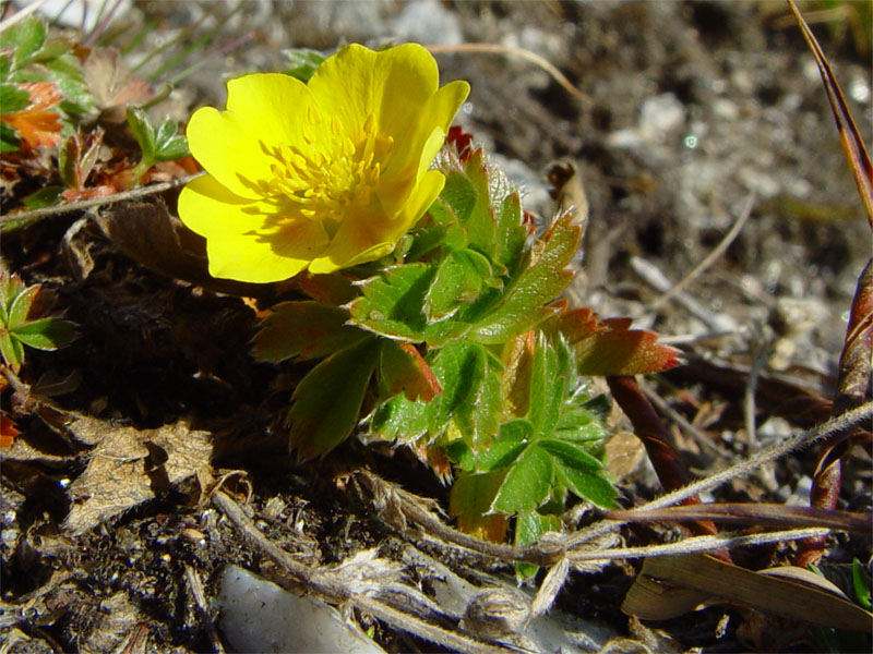 Ranunculus montanus Valmalenco, Sondrio Italy